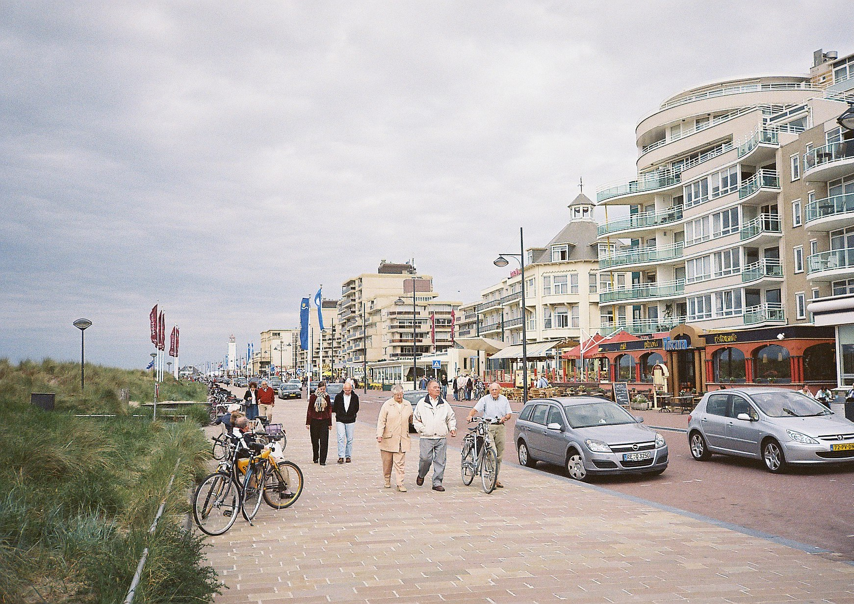 Die Strandpromenade in Noordwijk : Seaside promenade in Noordwijk : : promenada nadbrzeżna Source: own work Date: June 2007, Noordwijk, South Holland, Netherlands Author: Maschinenjunge Licence: GFDL, cc-by 3.0